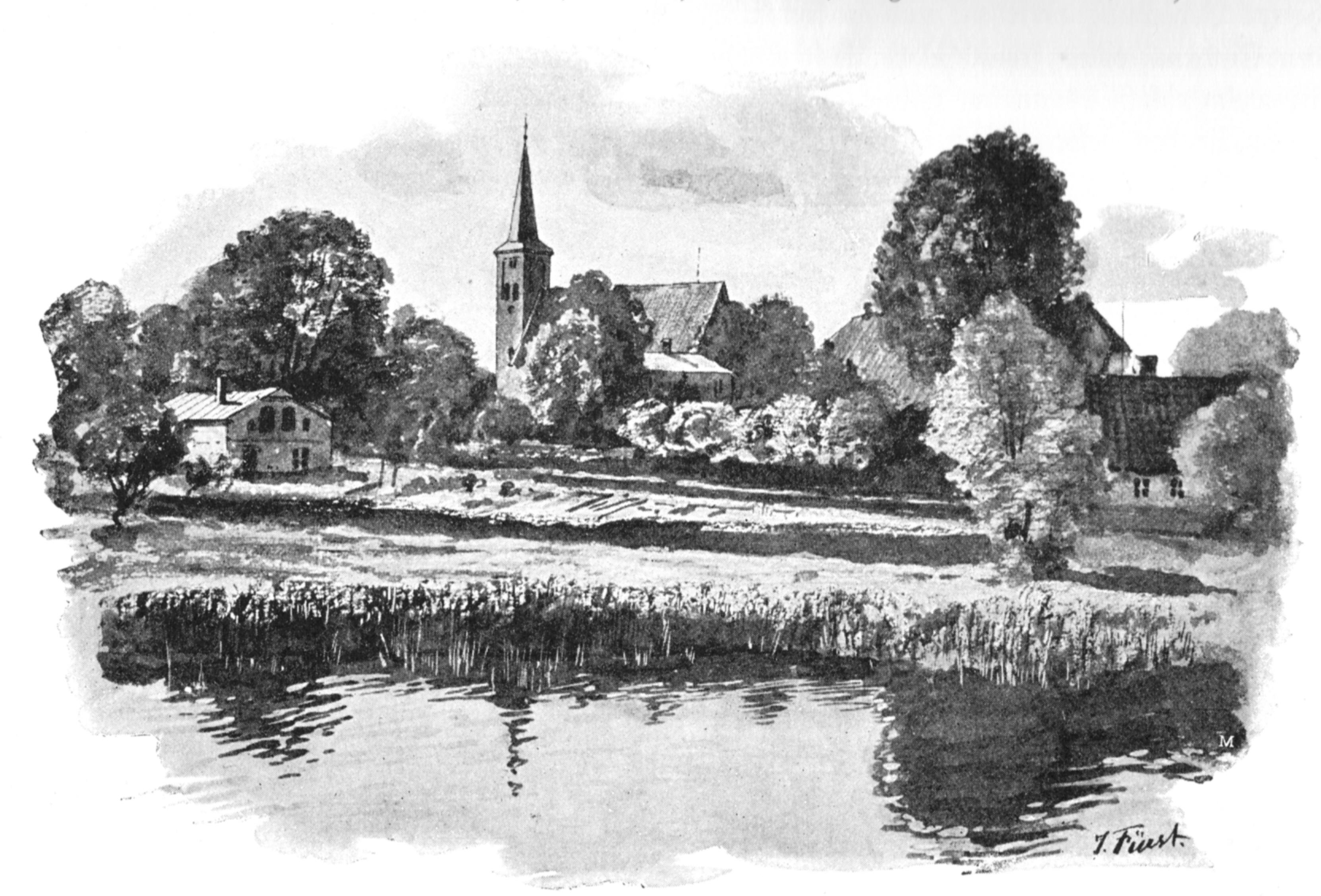 Blick über den Mühlenteich auf die Kirche in Bornhöved von Julius Fürst